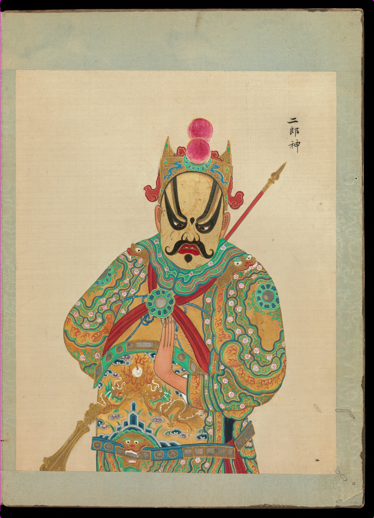 China; Album; Paintings